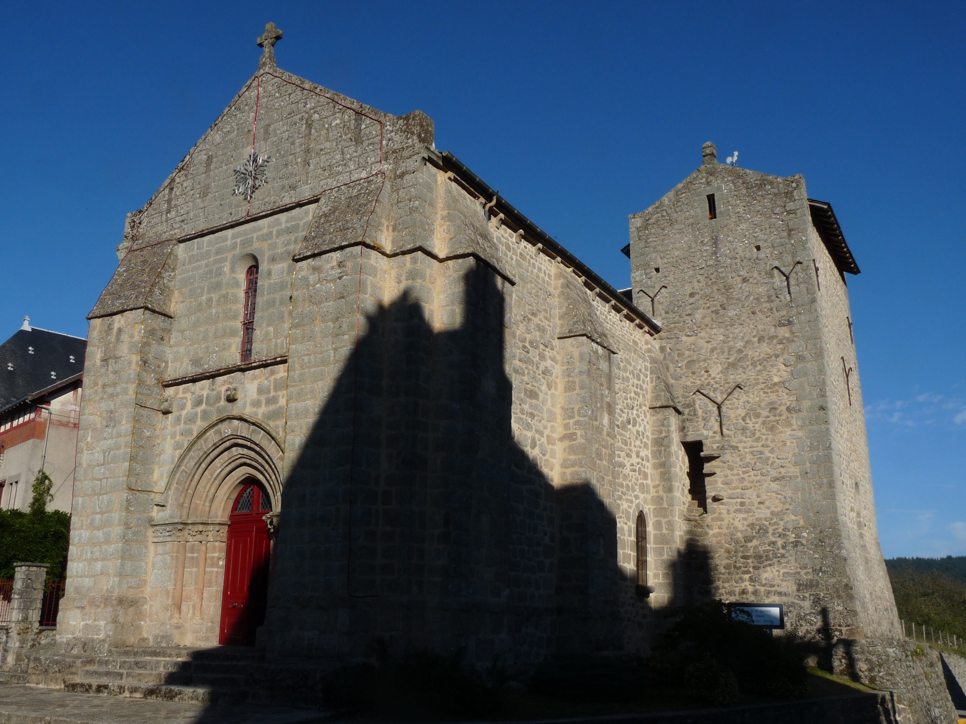 Eglise du bourg de Saint-Sulpice-Laurière (Haute-Vienne)